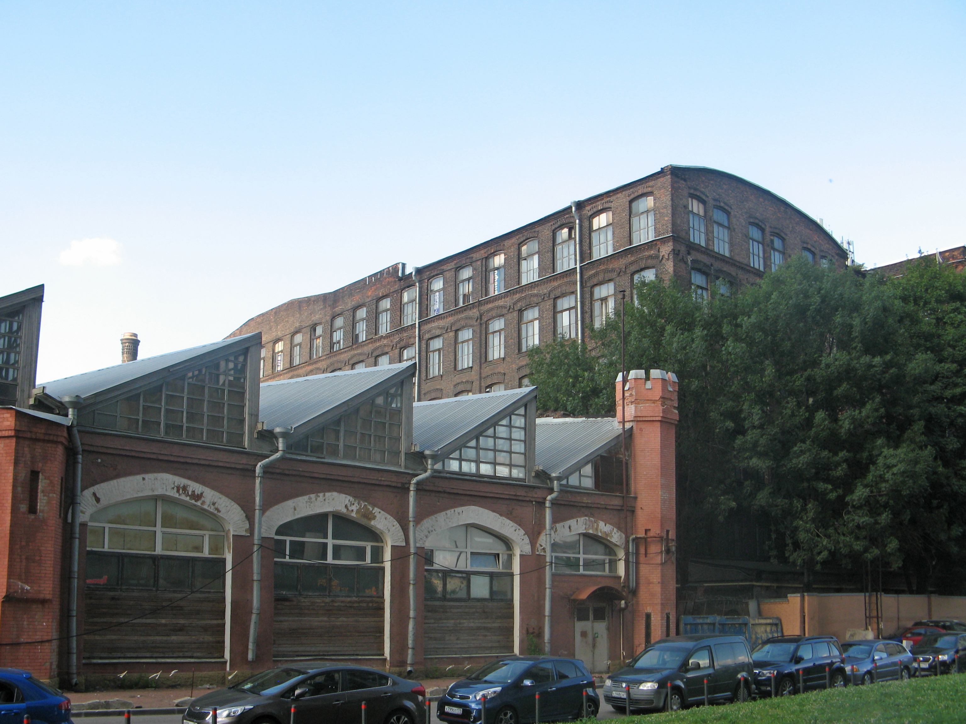 Производственные корпуса: Заставская улица, 33 литера БА, Московский район, Санкт-Петербург